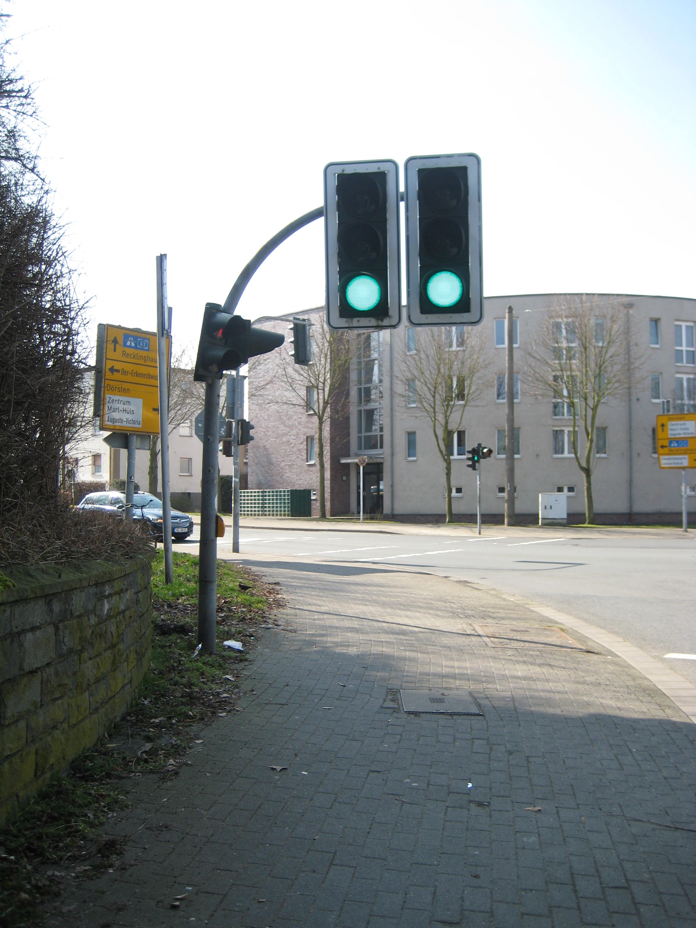 Sonderbau eines Ampelmastes am Bahnhof Sinsen (Marl, Bahnhofstraße)